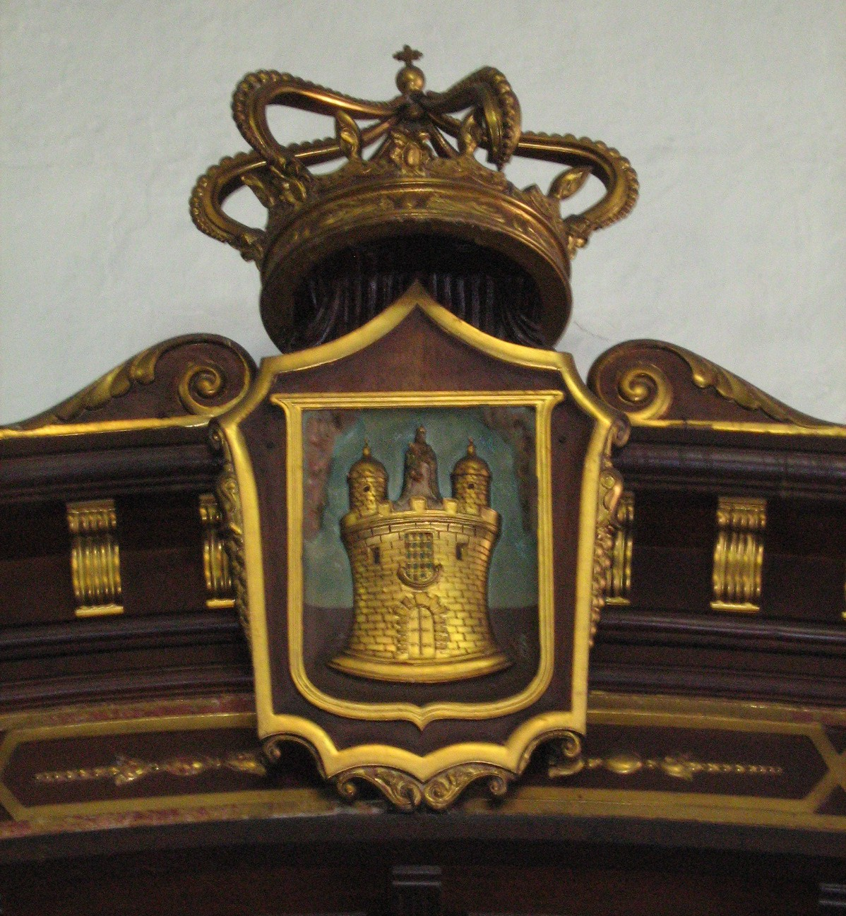 Escudo de Armas de Medellín, ubicado en el antiguo bautisterio de la Basílica Menor de Nuestra Señora de la Candelaria. Medellín, (Colombia)